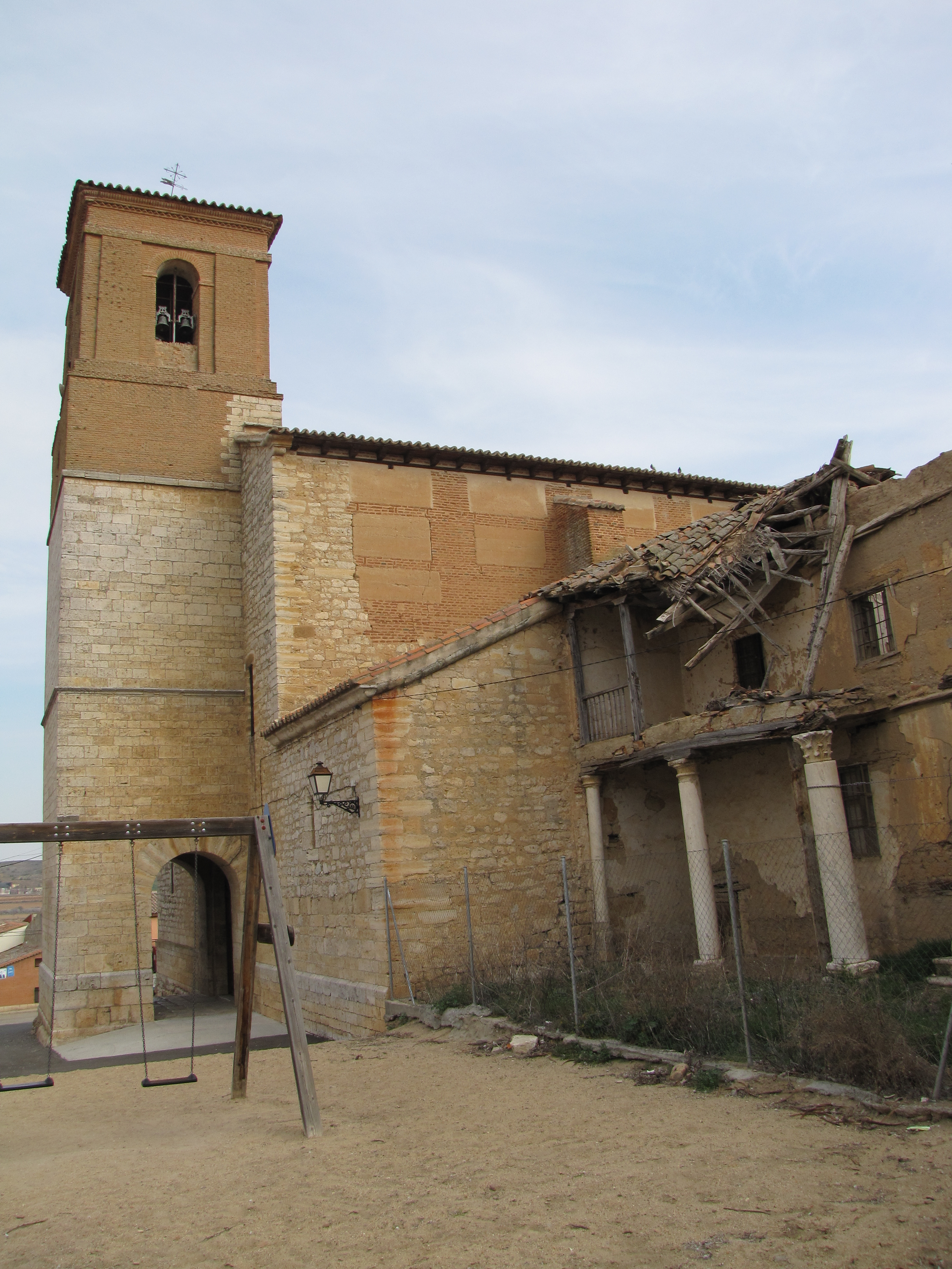 Iglesia parroquial - Vista general 2